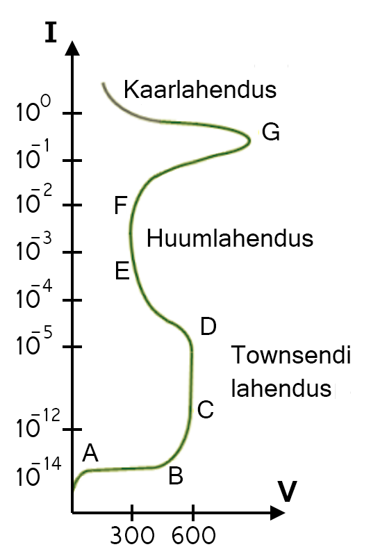 Voolu-pinge graafik neoonikeskkonnas rõhul 133 Pa